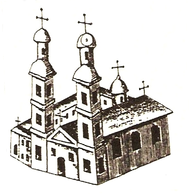 Беларуская (тарашкевіца): Ворша (Vorša). Касьцёл Найсьвяцейшай Панны Марыі і кляштар бэрнардынаў